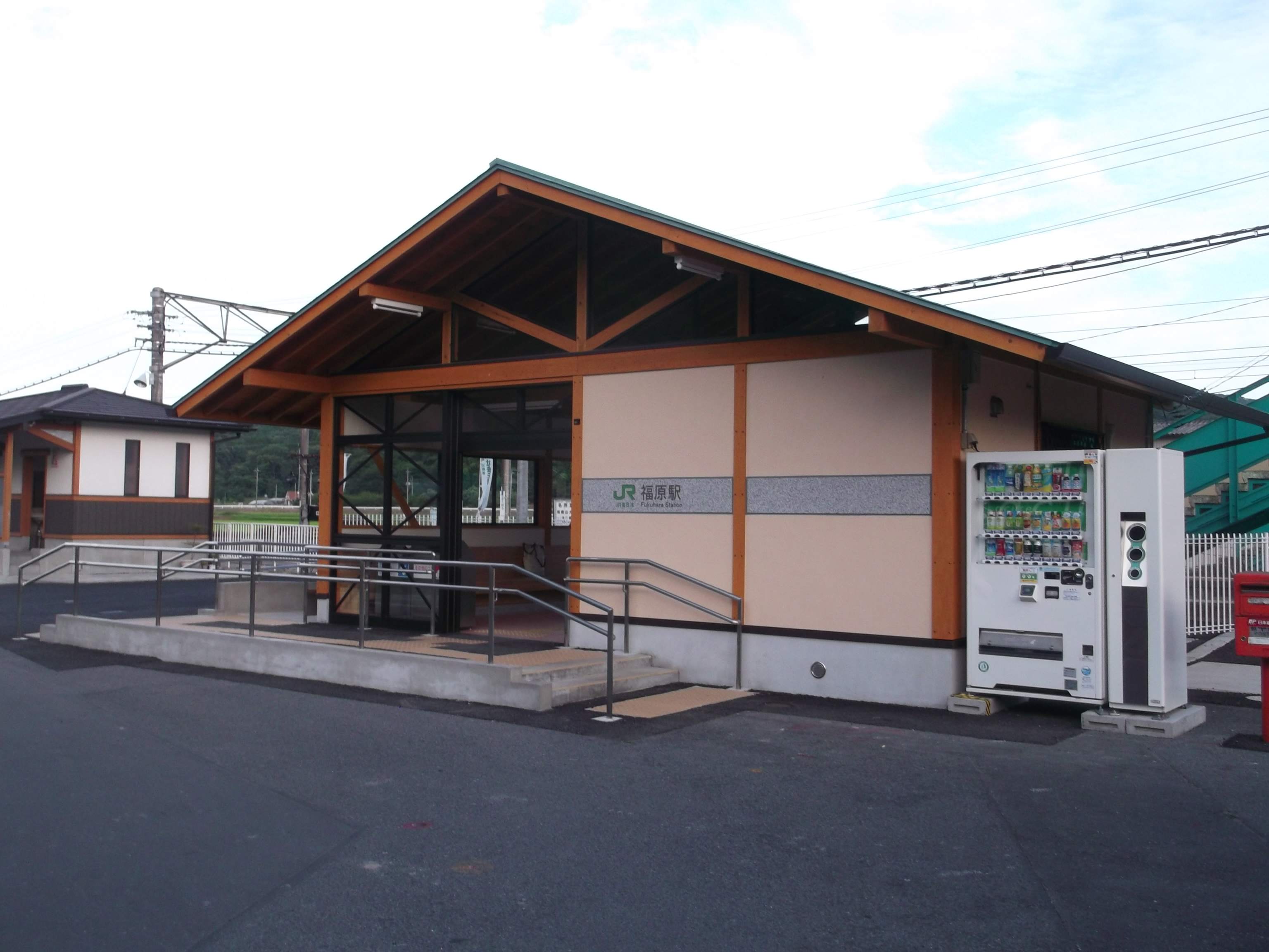 JR水戸線 福原駅